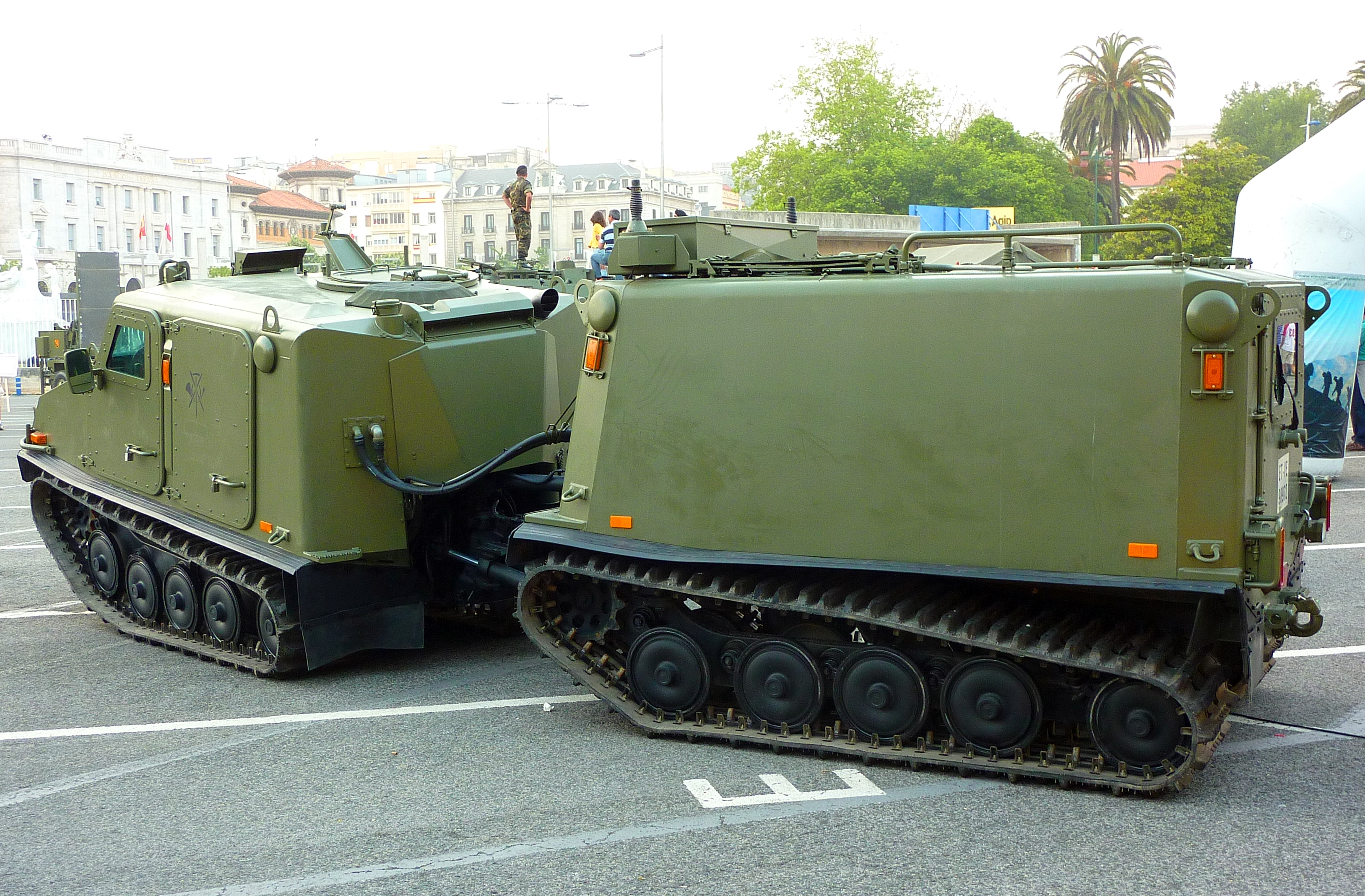 Bv-206S del Ejército Español